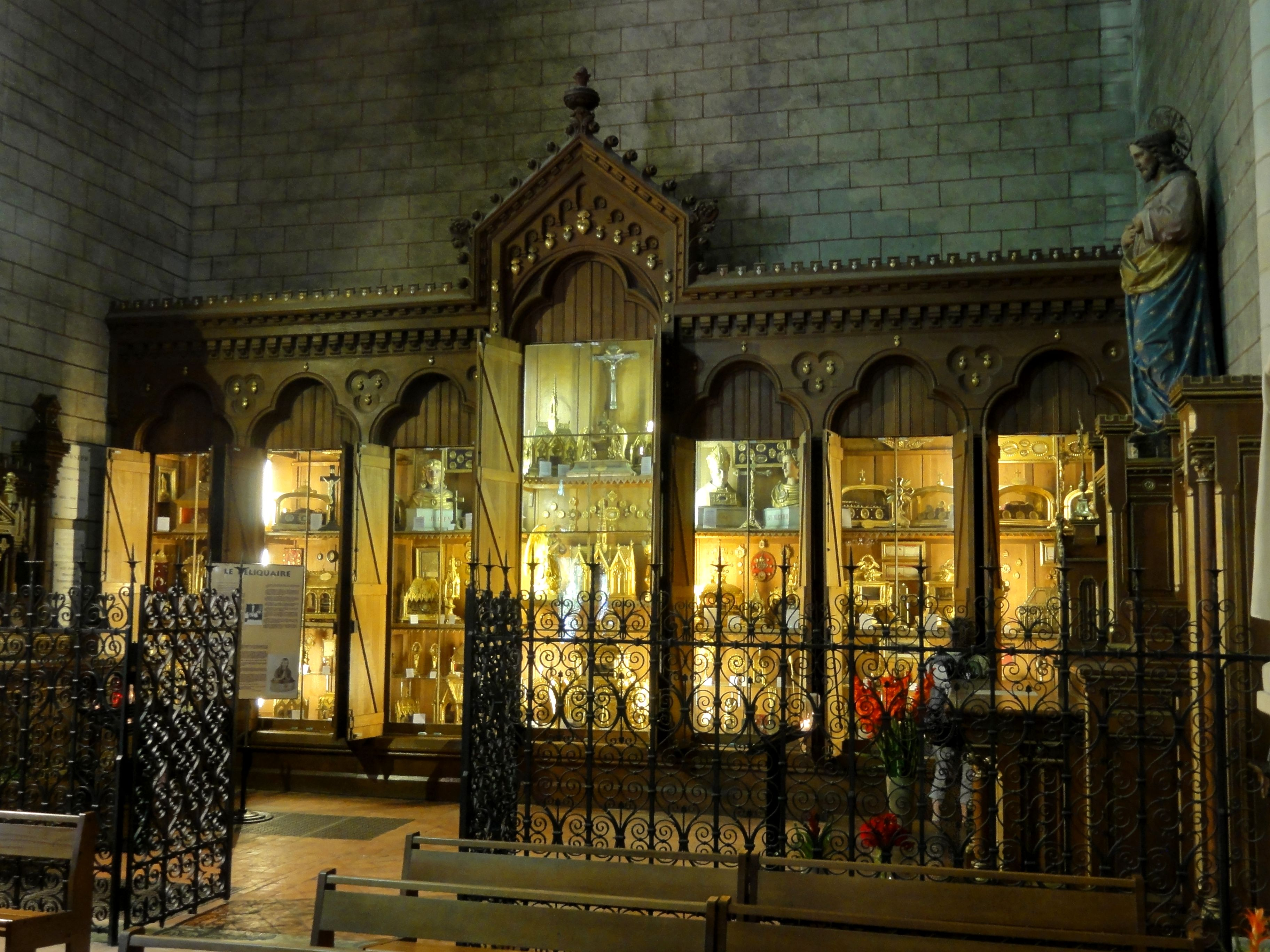 Grand reliquaire dans le croisillon nord, vue d'ensemble.